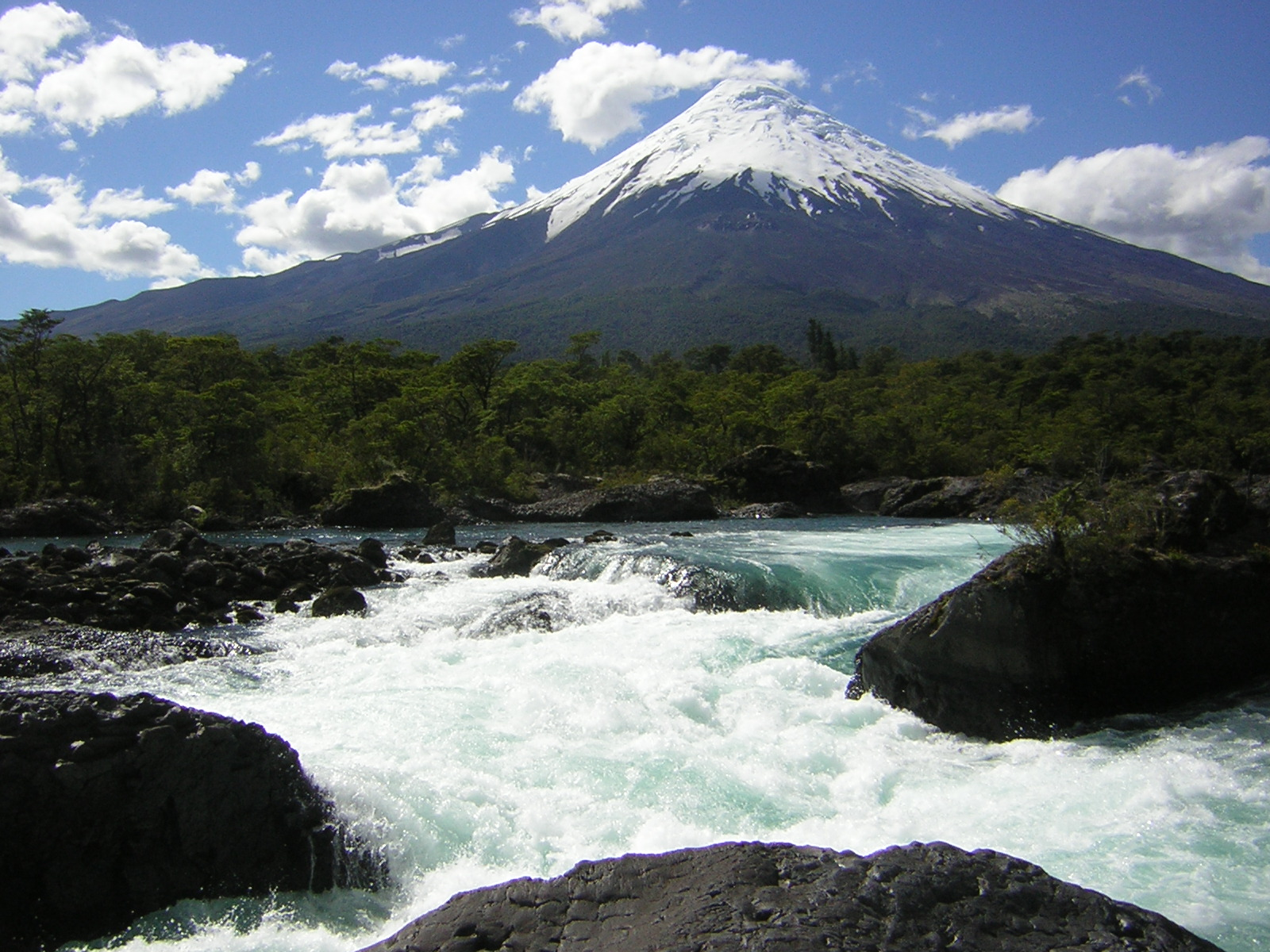 Volcan Osorno, desde Los Saltos del Petrohue